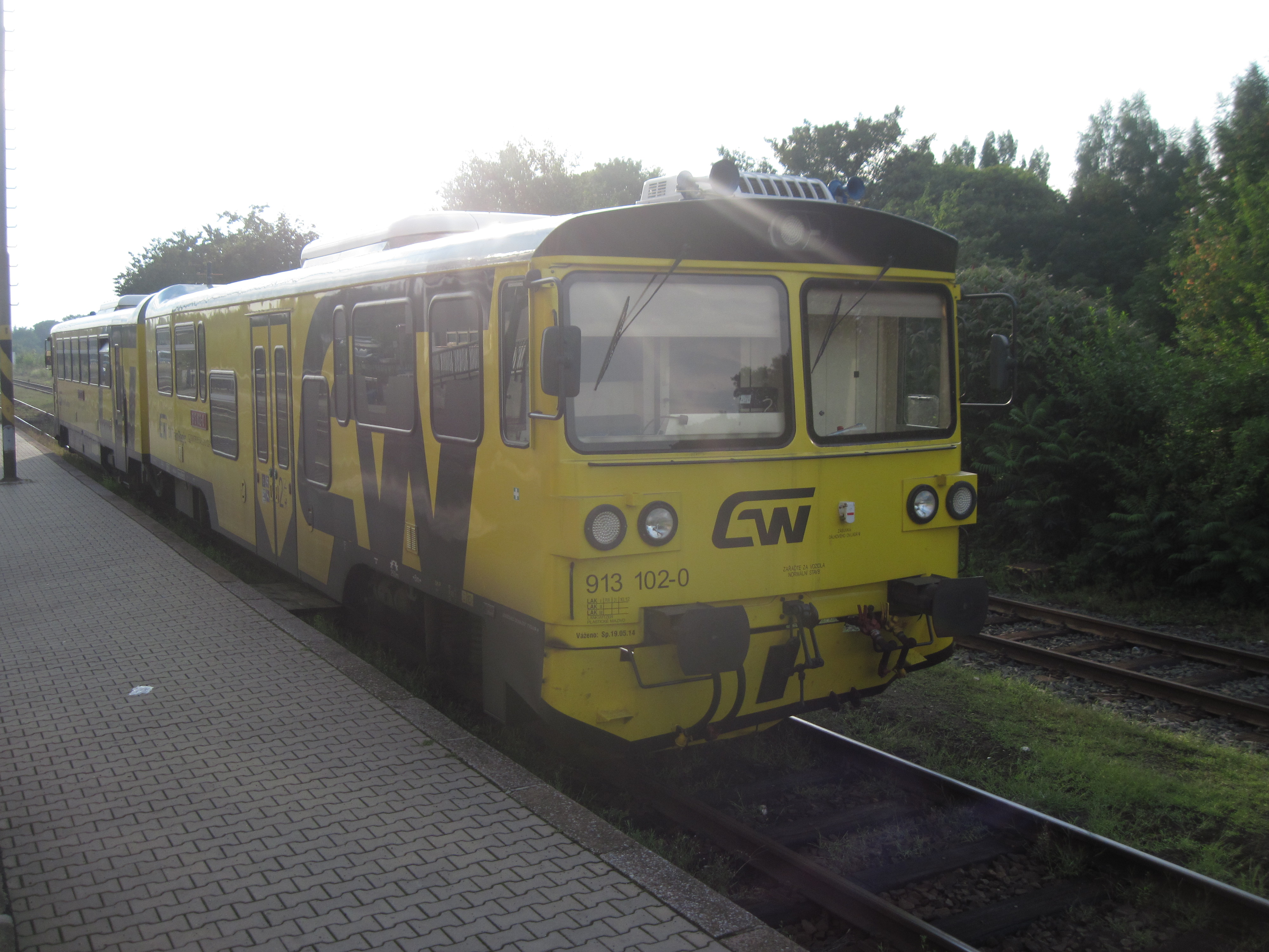 Motorová jednotka 813.102/913.102 ve stanici Karlovy Vary dolní nádraží